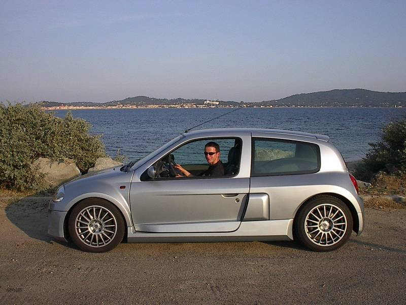 Renault Clio V6 und sein Besitzer